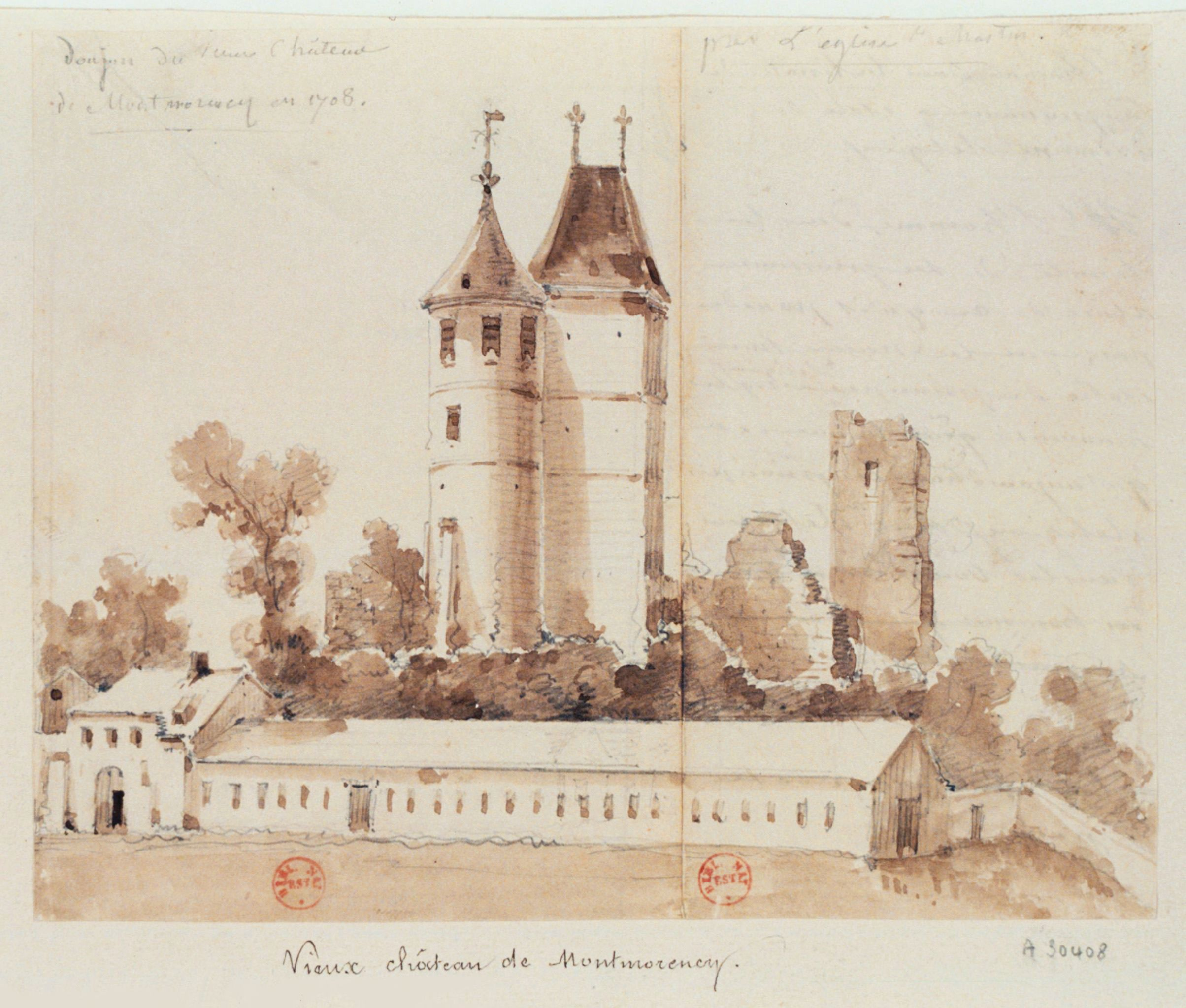 Donjon du vieux Château de Montmorency en 1708 près l'église St Martin. Dessin à la mine de plomb, lavis à l'encre brune, 14,6 x 18,3 cm. Dessin sur deux morceaux de papier collés bord à bord. Collectionneur : Hippolyte Destailleur (1822-1893).